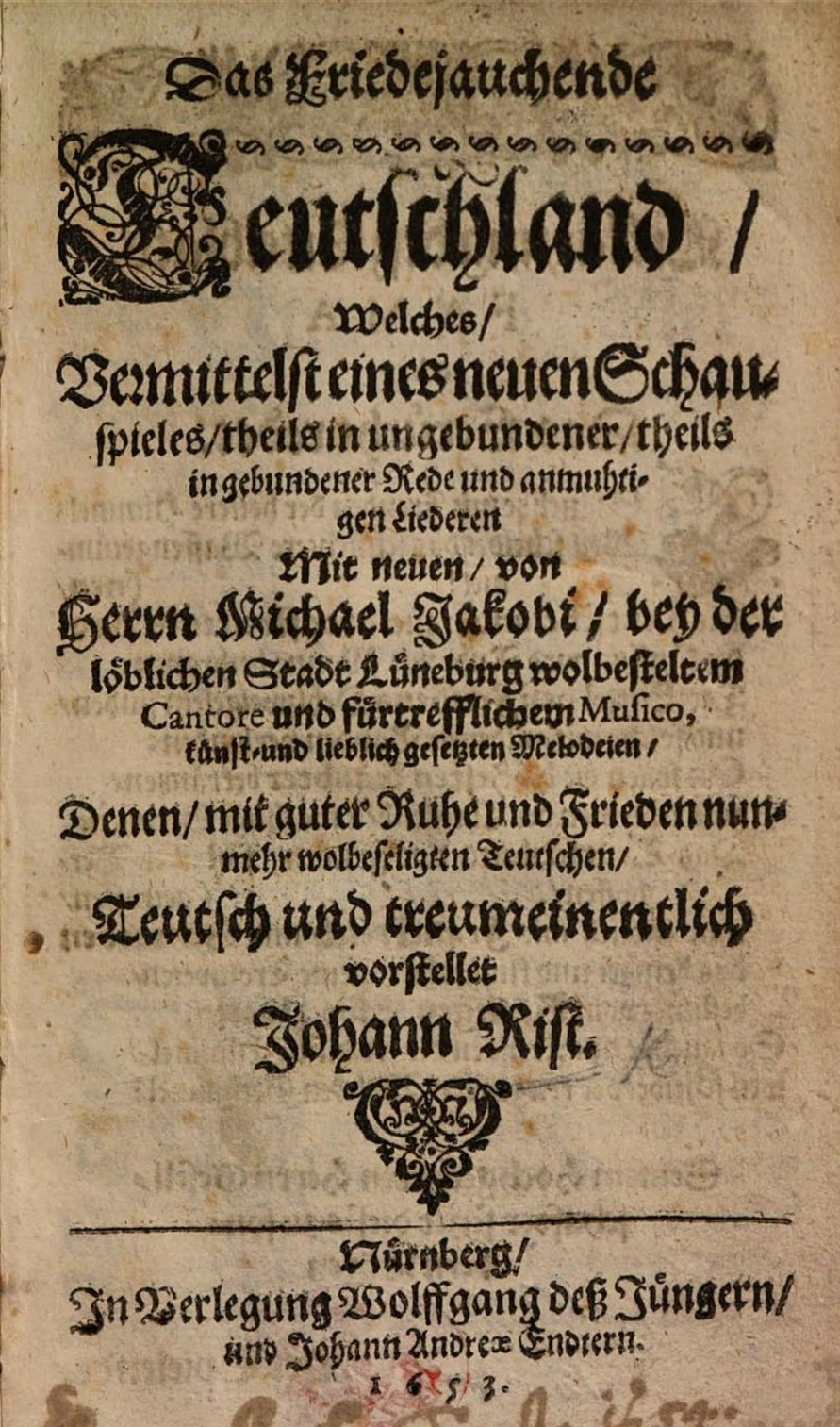 Johann Rist und Michael Jakobi: Das Friedejauchende Teutschland. Nürnberg 1653, Titelseite